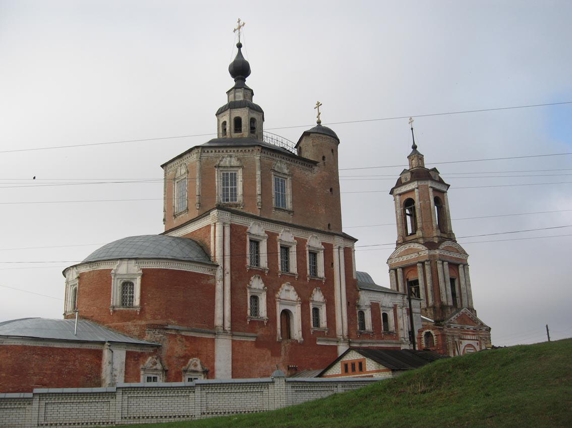 Село Бережок близ Карачева. Воскресенский храм (кон. XVII в.